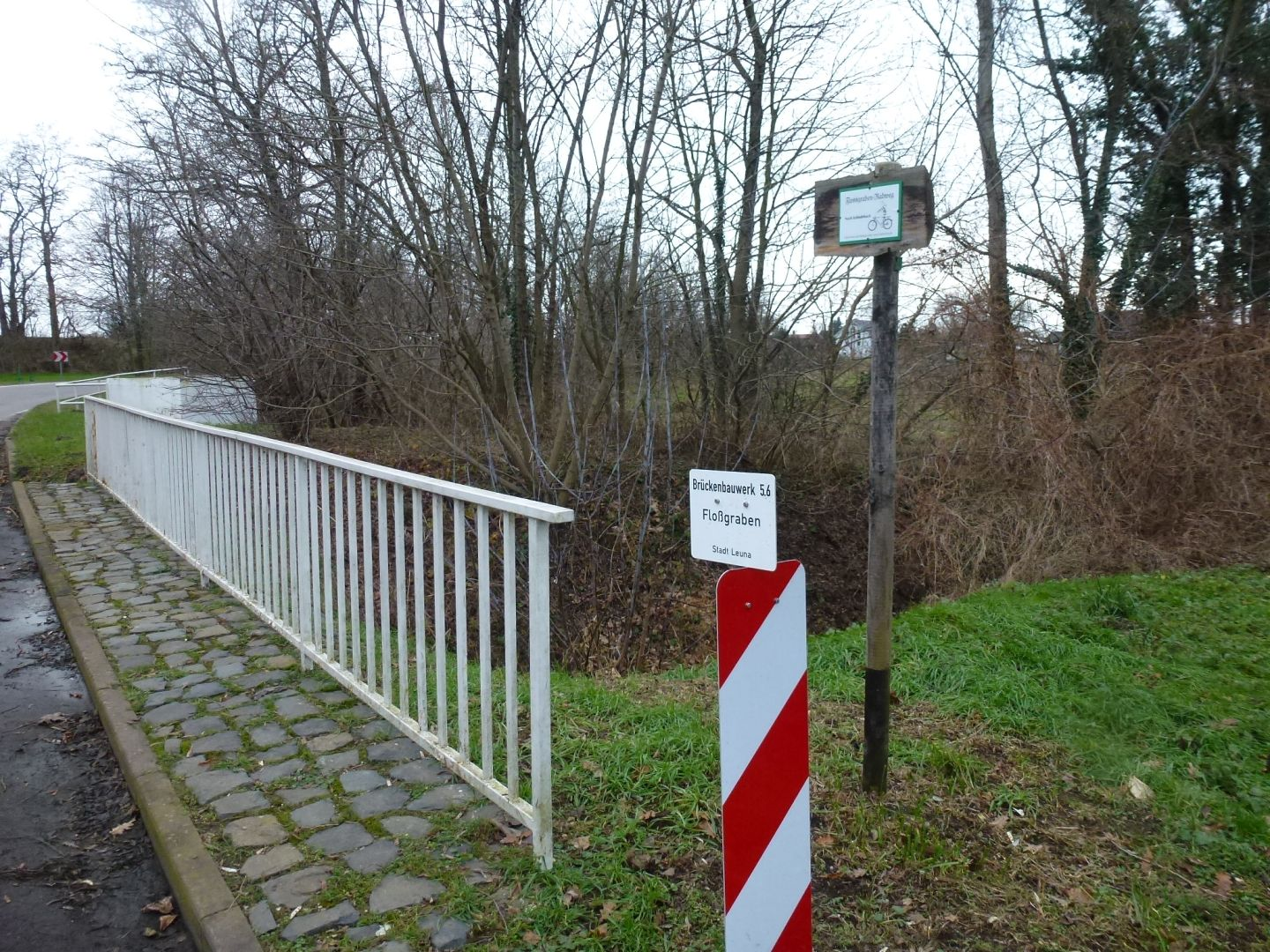 Brücke über den Floßgraben in Schladebach